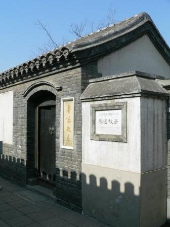 鲁迅故居 大门 拍摄